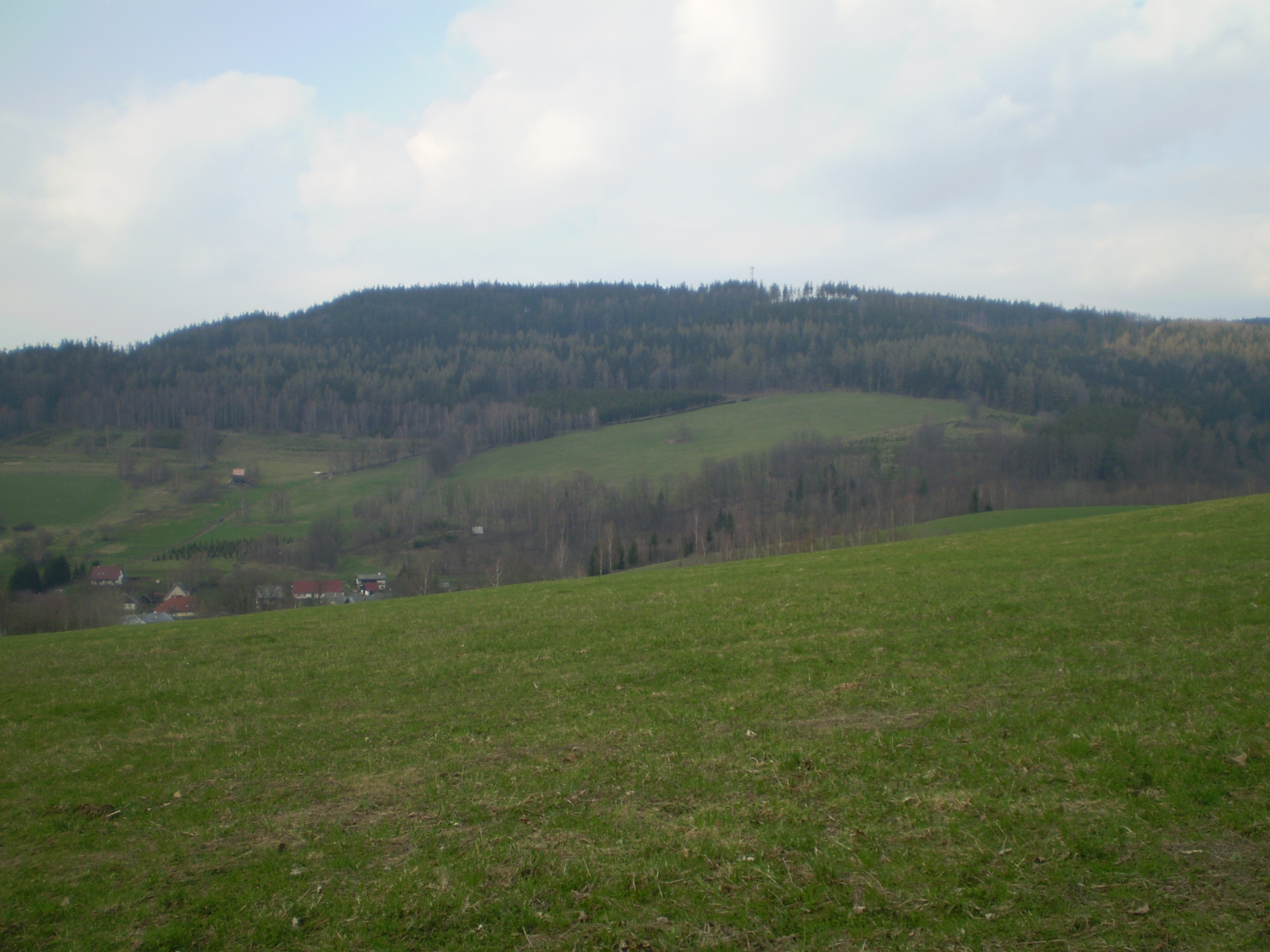 Hejnov, Orlické hory